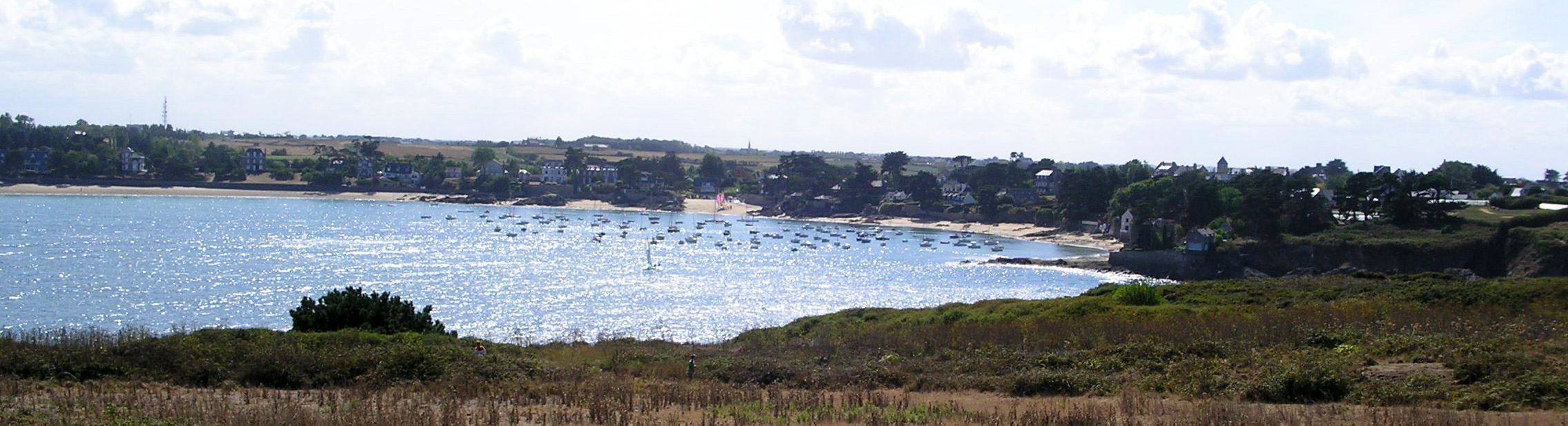 Panorama du havre de Rothéneuf (Bretagne, France)